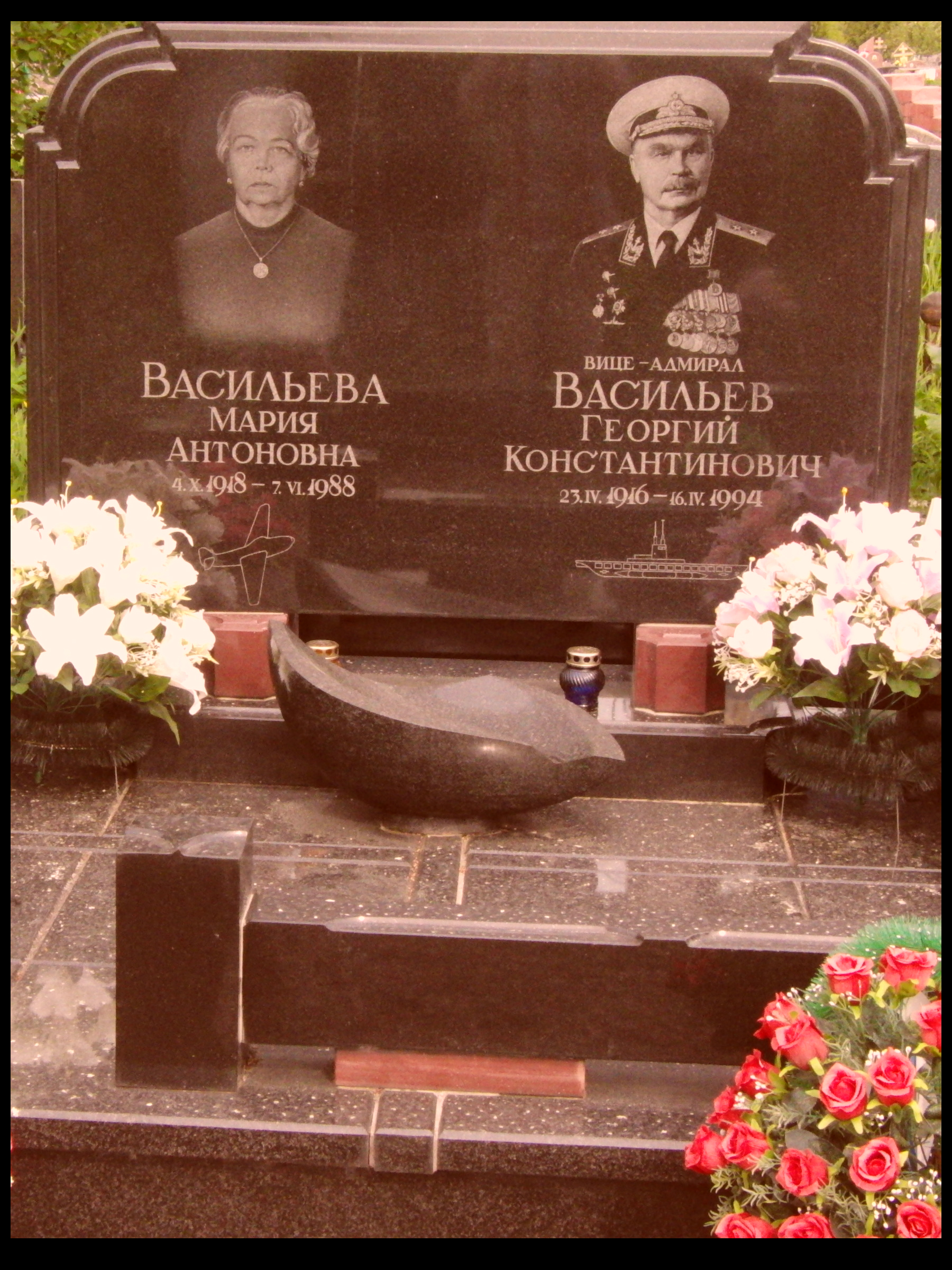 Памятник вице-адмиралу Васильеву Г.К. на Щербинском кладбище города Москвы